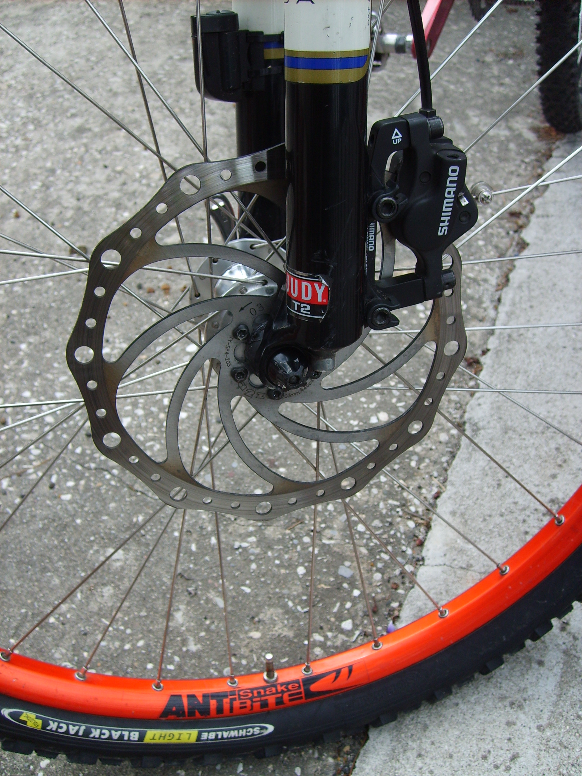 Freno a disco da 180mm di una Mountain Bike